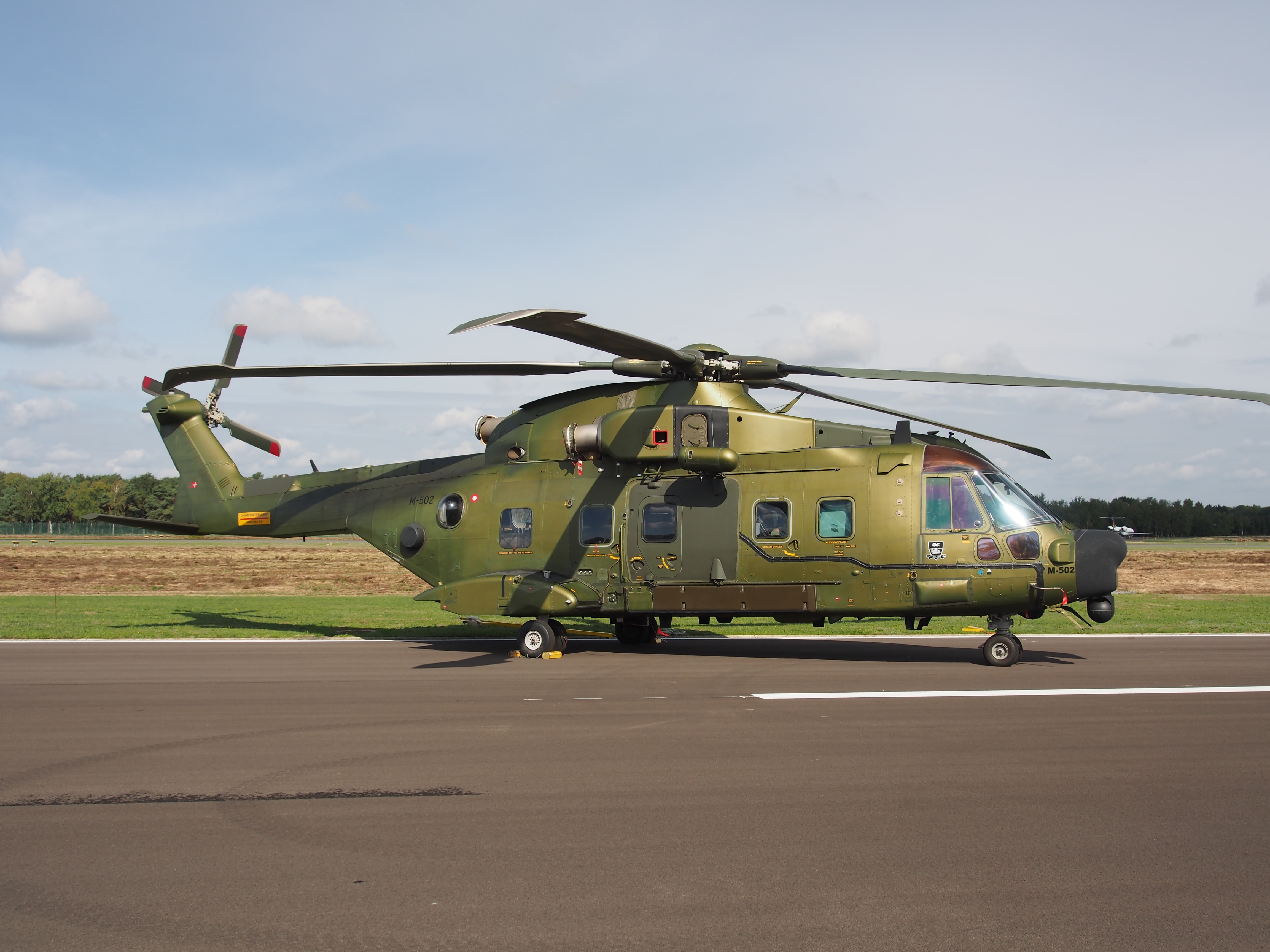 Photographed at Kleine Brogel Air Base, Belgium.